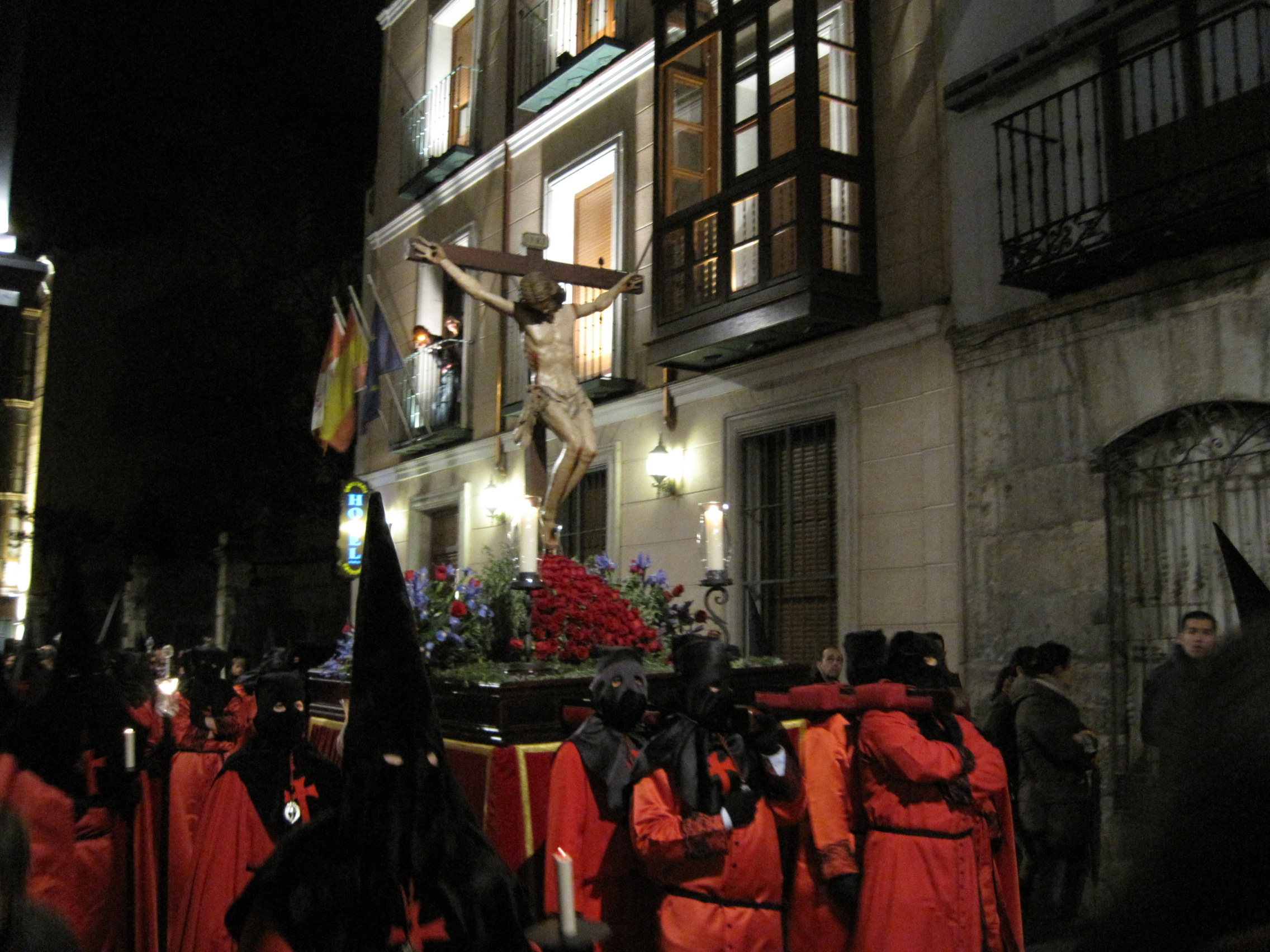 Cristo del Olvido. Venerable Cofradía de la Preciosísima Sangre de Nuestro Señor Jesucristo, Valladolid (España).